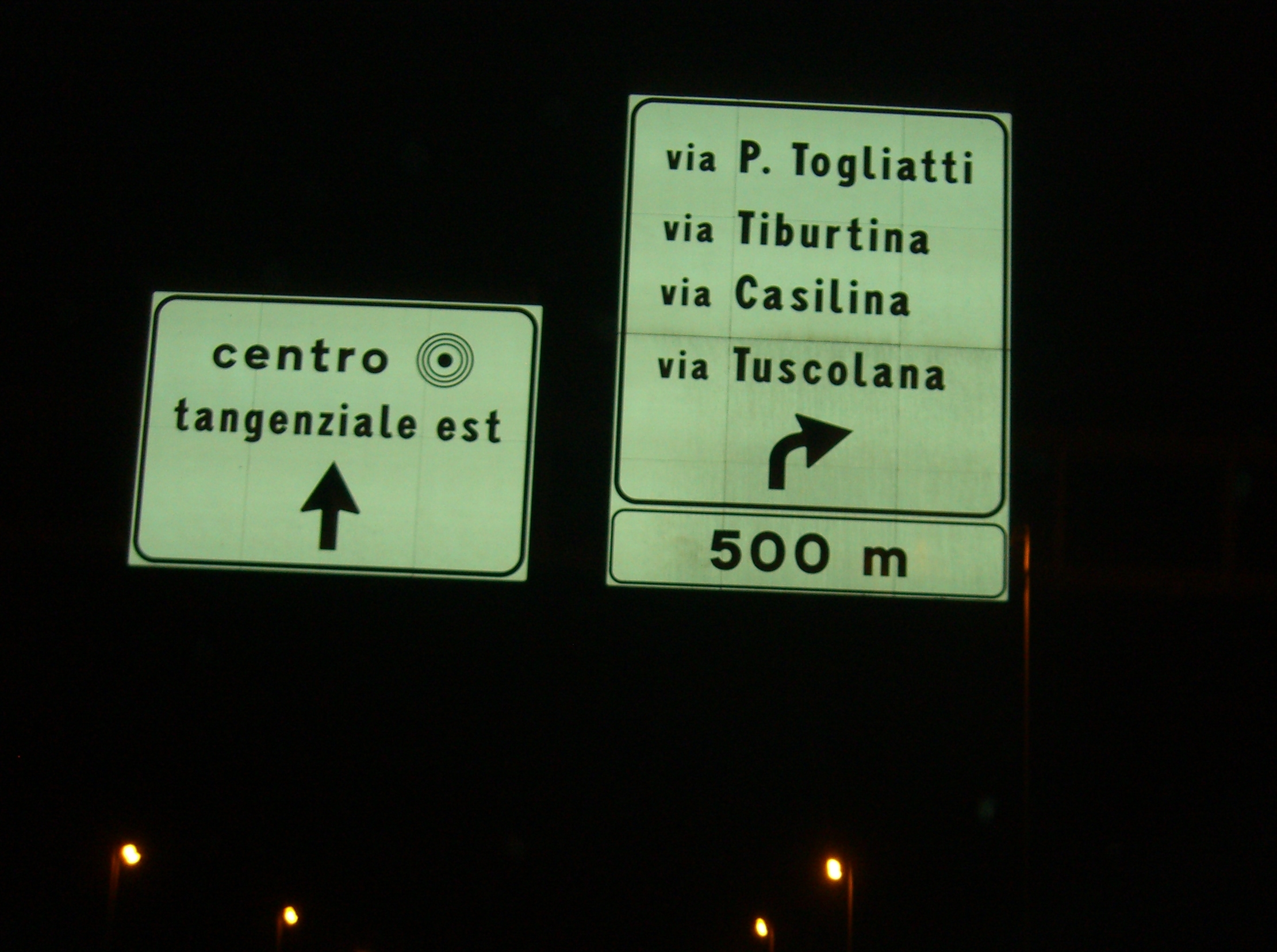 L'uscita di Viale Palmiro Togliatti nel tratto urbano della A24 in direzione Roma.